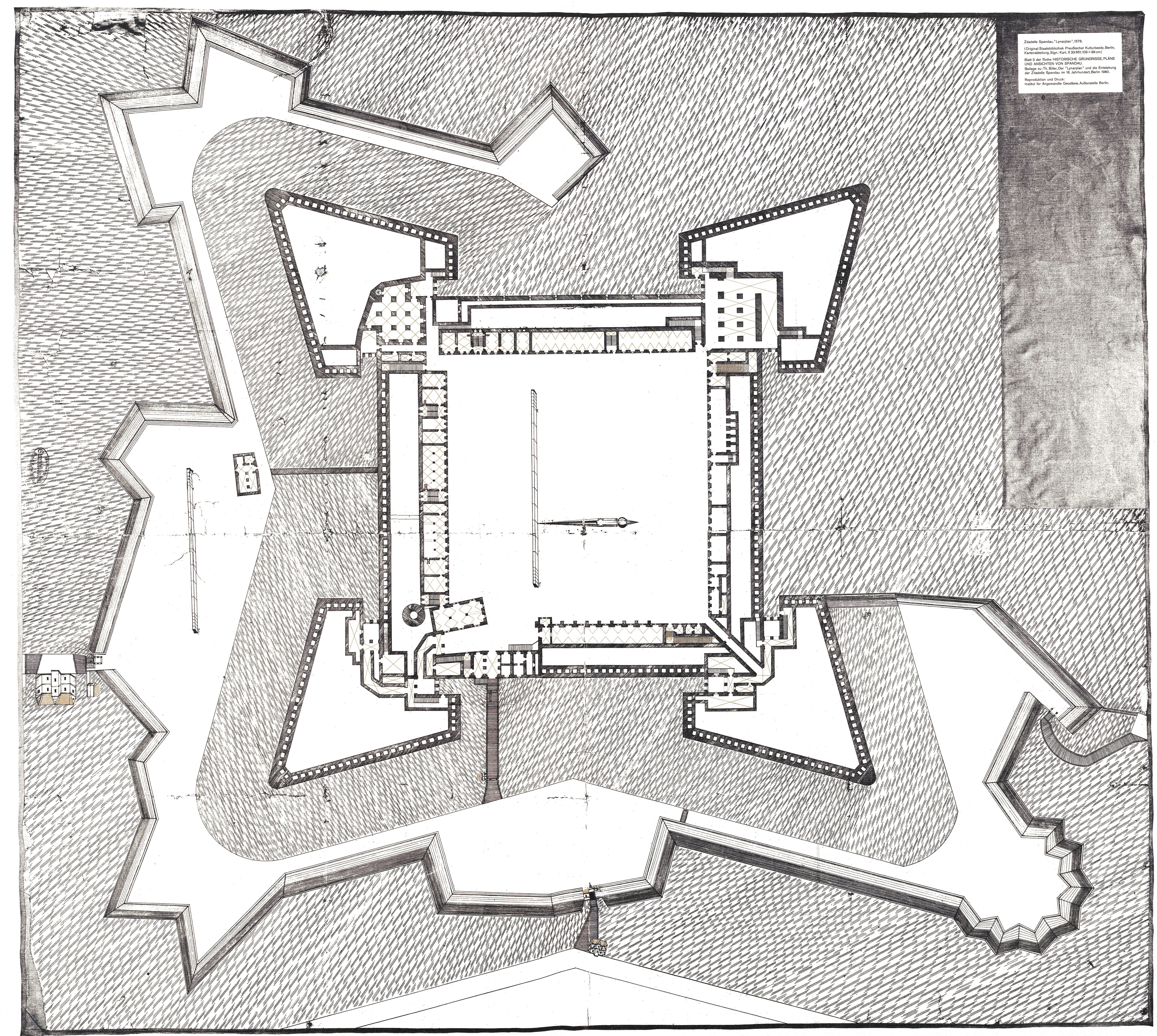 Lynarplan